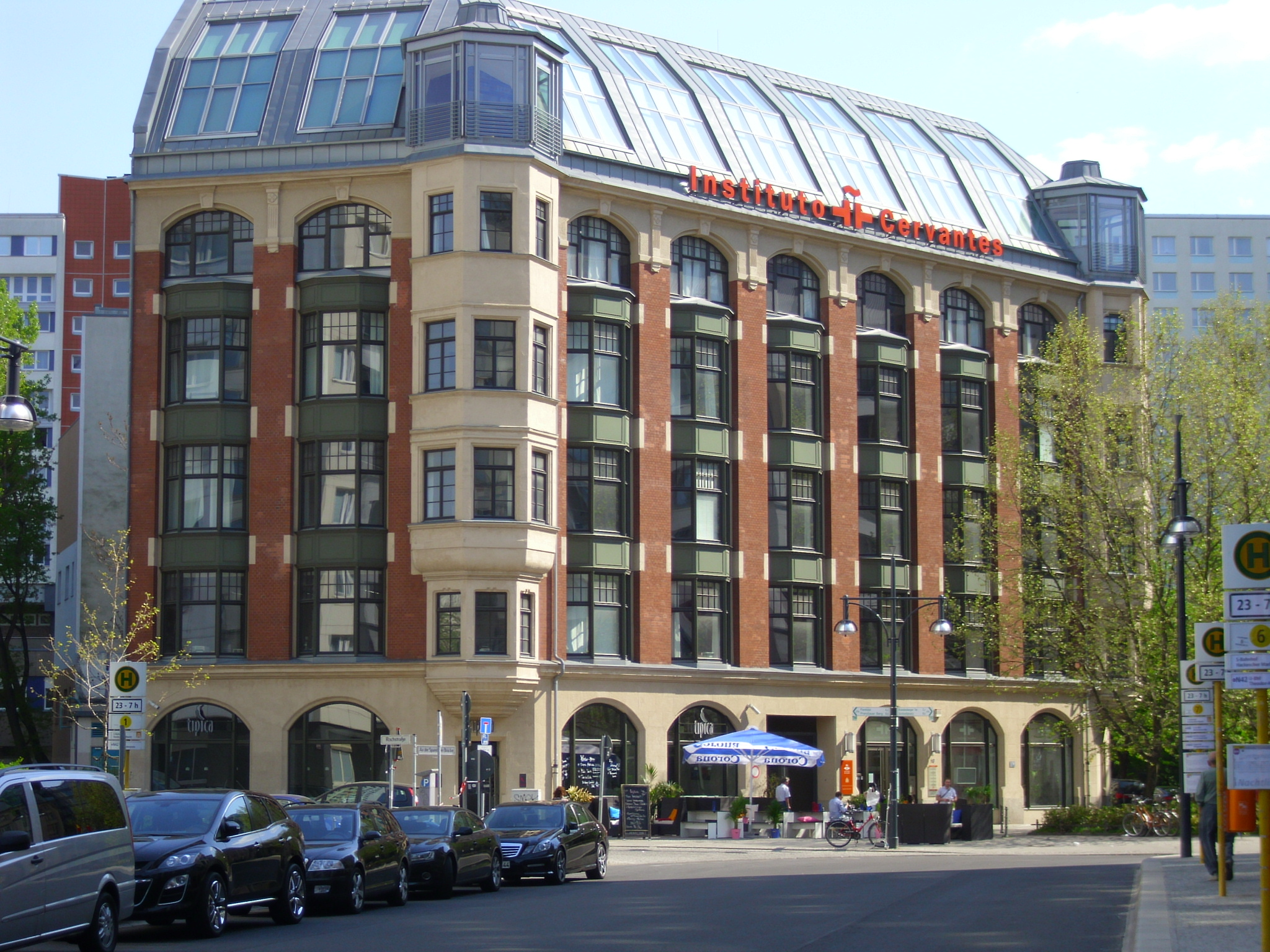 Ehemaliges denkmalgeschütztes Geschäftshaus im Ensemble Rosenstraße Ecke Rochstraße, erbaut 1894-1895 von Kayser & von Großheim und Otto March als Kaufhaus Cöln, jetzt Sitz des Instituto Cervantes Berlin(Spanisches Kulturinstitut)